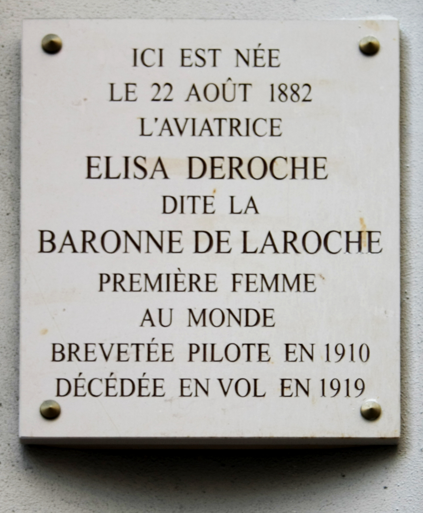 Gedenktafel zur Erinnerung an Élise Deroche, 61 rue de la Verrerie in Paris